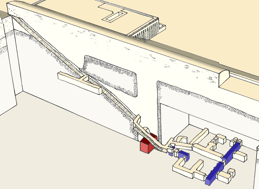 Infrastructures de la tombe sud du complexe funéraire de Djoser à Saqqarah